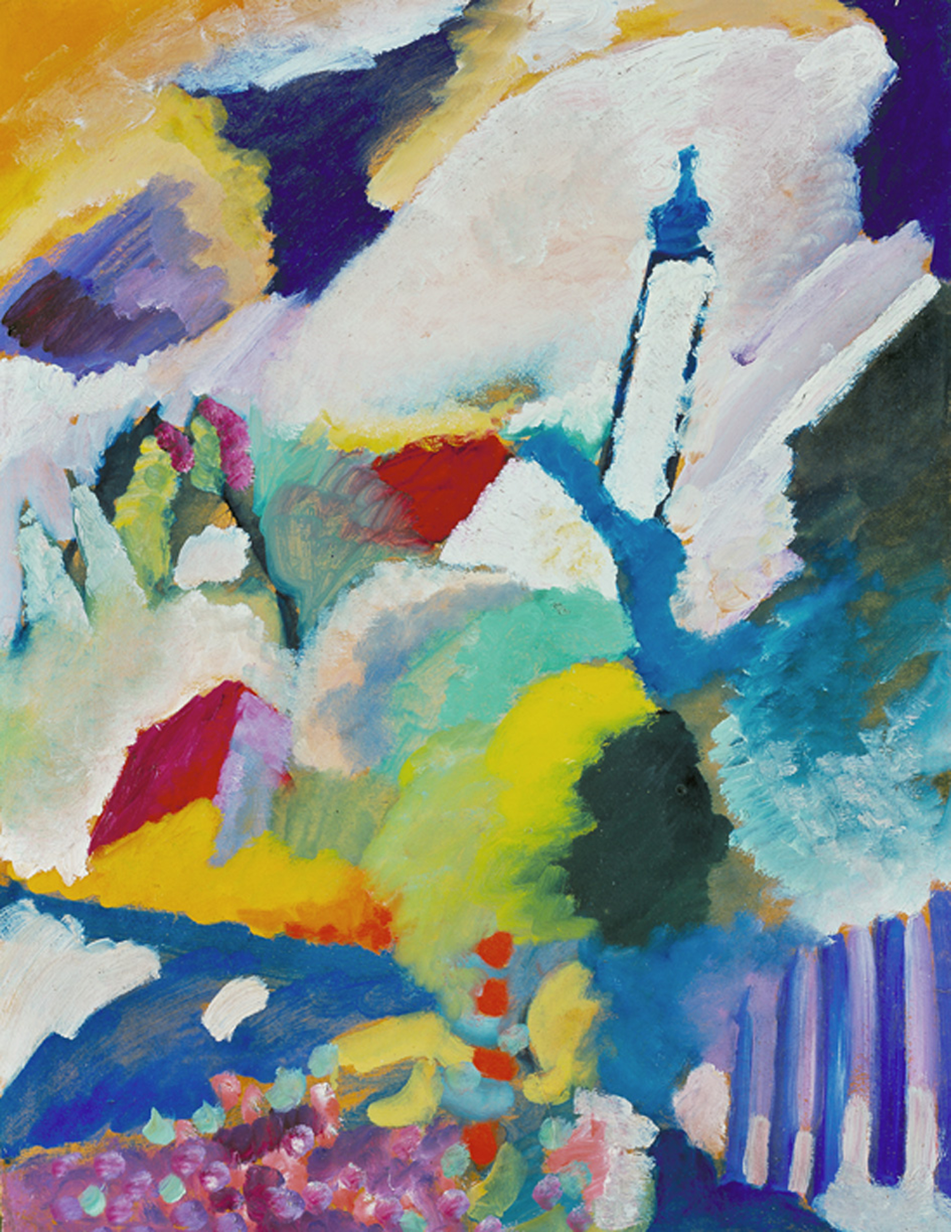 Wassily Kandinsky, Murnau mit Kirche I, 1910, Städtische Galerie im Lenbachhaus und Kunstbau, München